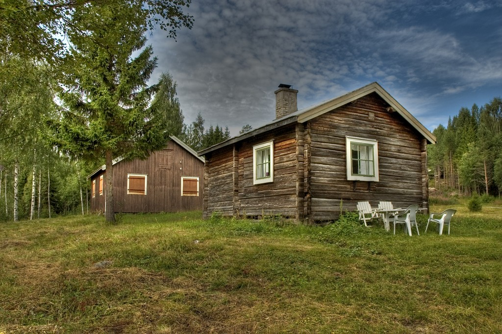 Kragoms fäbodar i Ångermanland. Photo : Thomas Hagfors